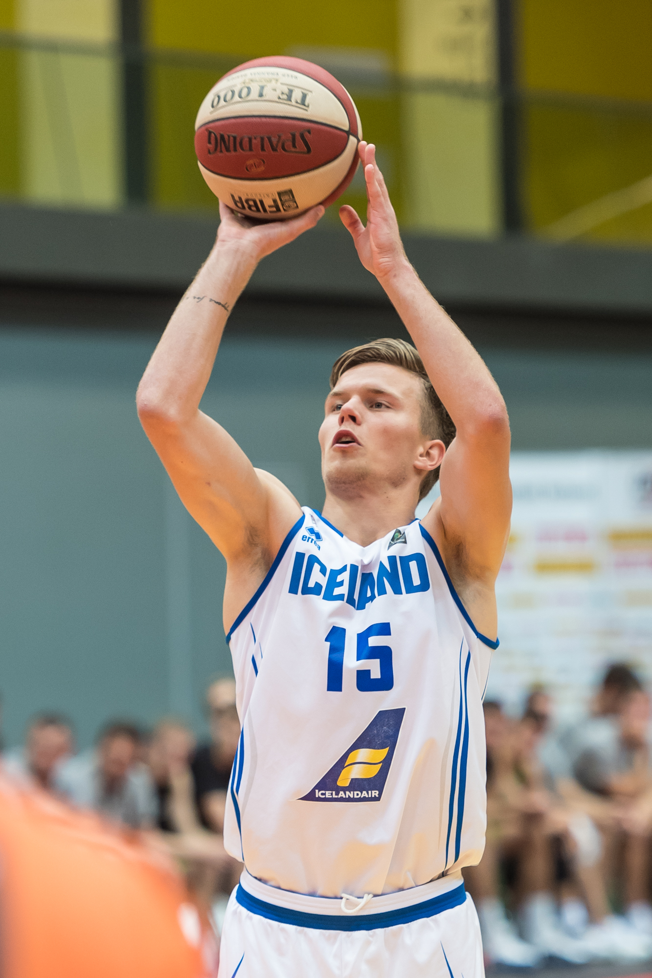 ÖBV Vier-Nationen-Turnier vom 12.-14. August 2016 in Schwechat - Island vs Slowenien. Bild zeigt Martin Hermannsson (ISL).